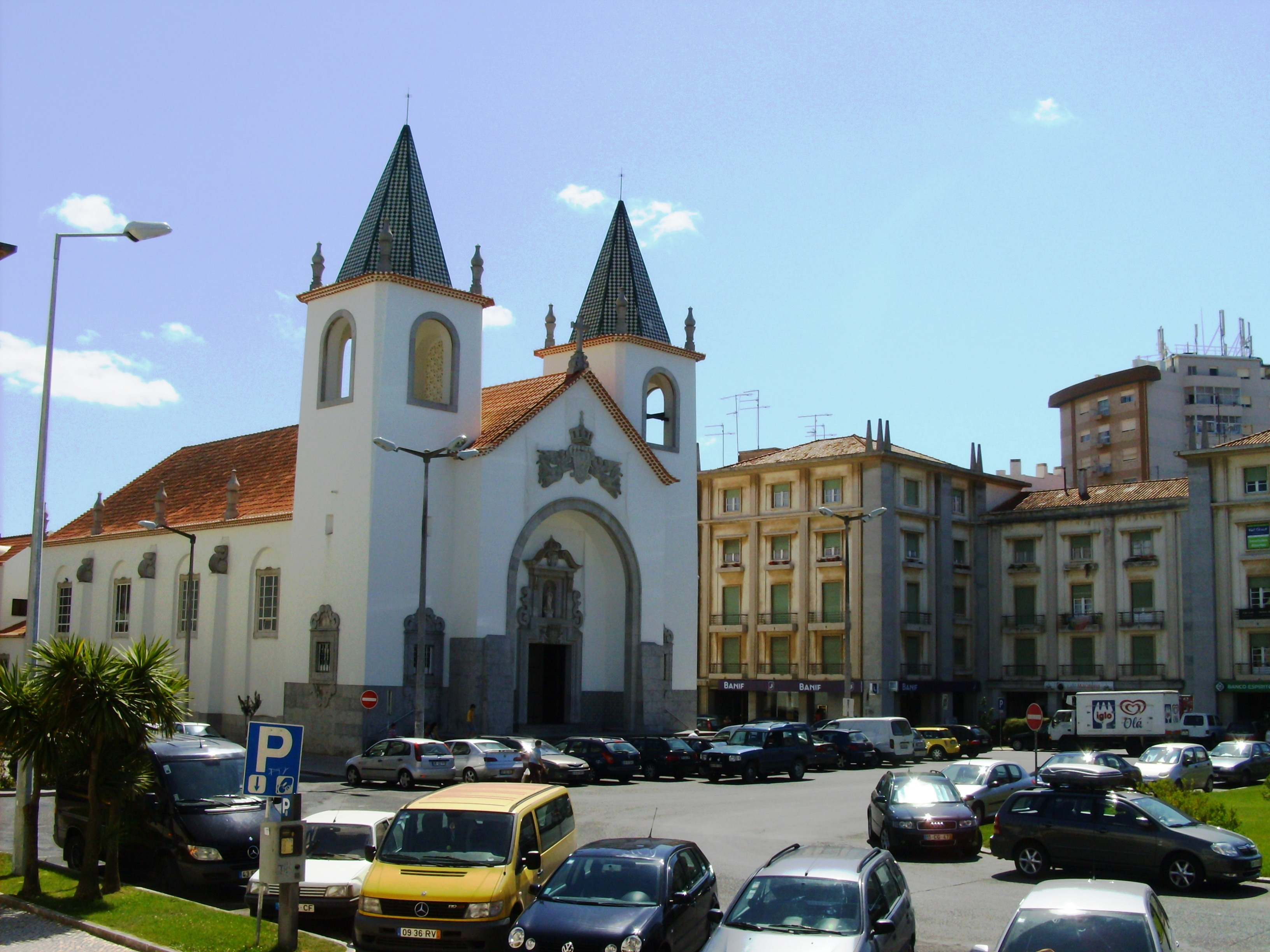 Igreja de Nossa Senhora da Conceição, Caldas da Rainha, distrito de Leiria, Portugal.